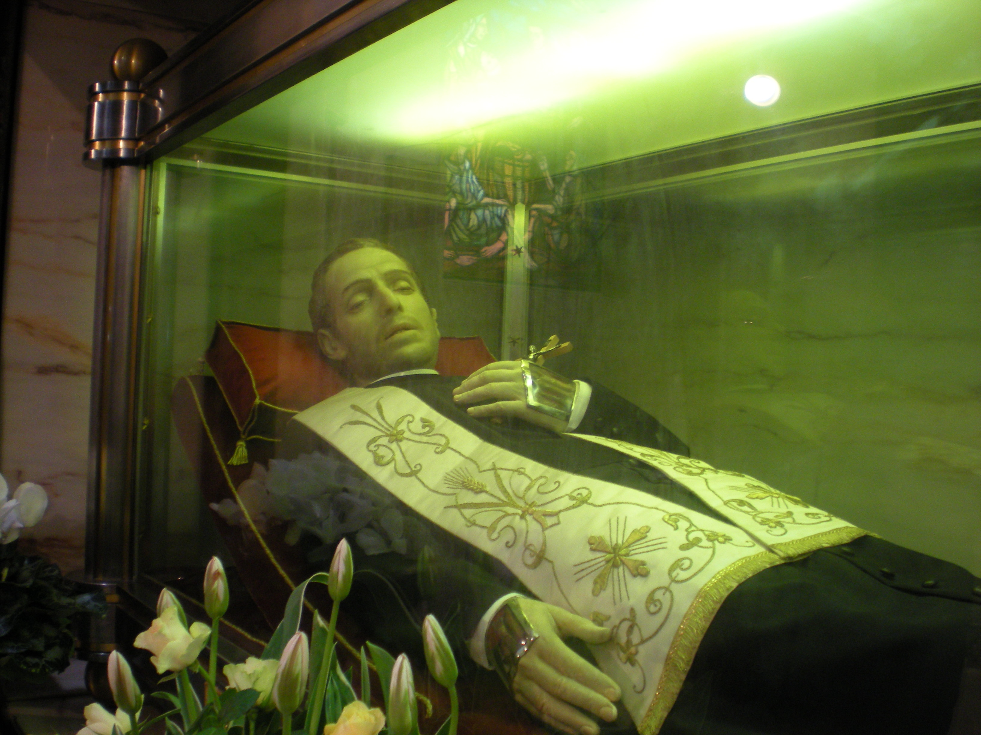 Fotografia della salma del beato Giacomo Cusmano che oggi riposa nell'orfanotrofio Terre Rosse a Palermo